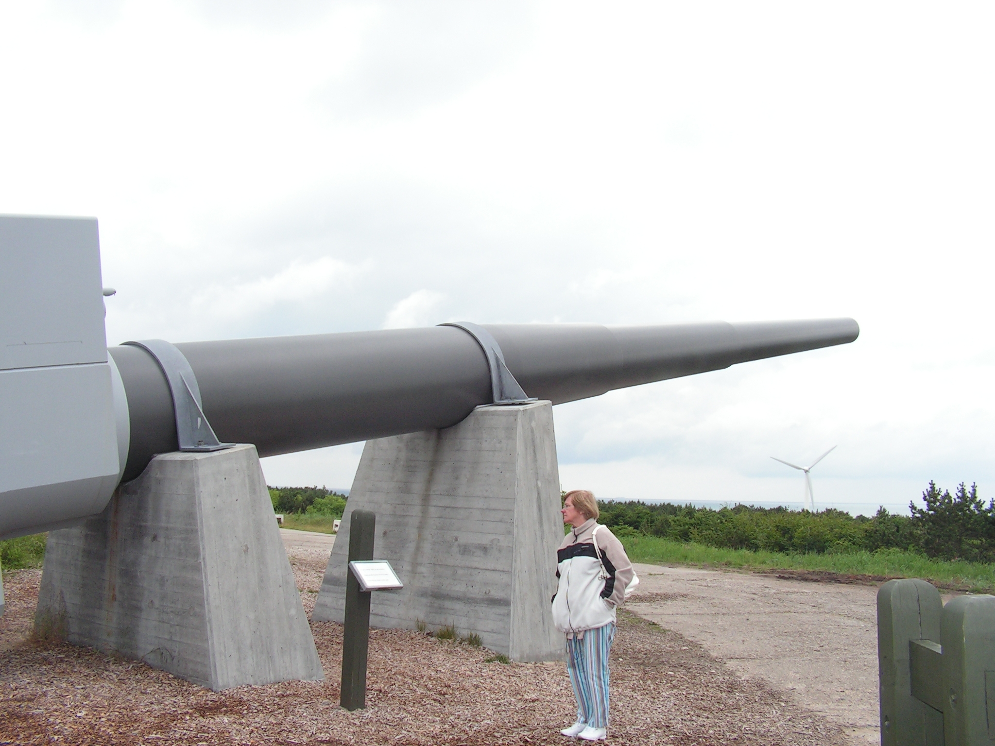 Geschützrohr der II. Batterie in Hanstholm